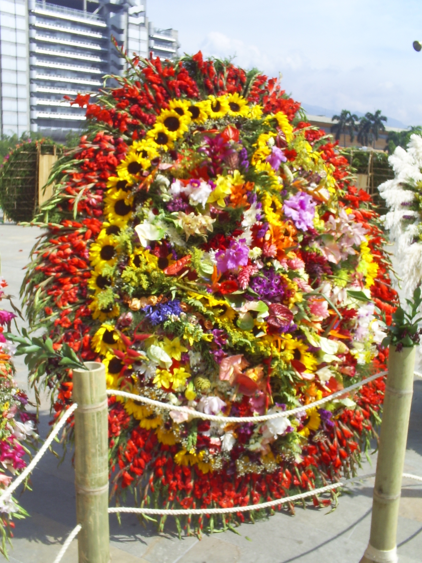 Desfile de Silleteros 2007, silletas expuestas después del desfile. Medellín, Colombia.